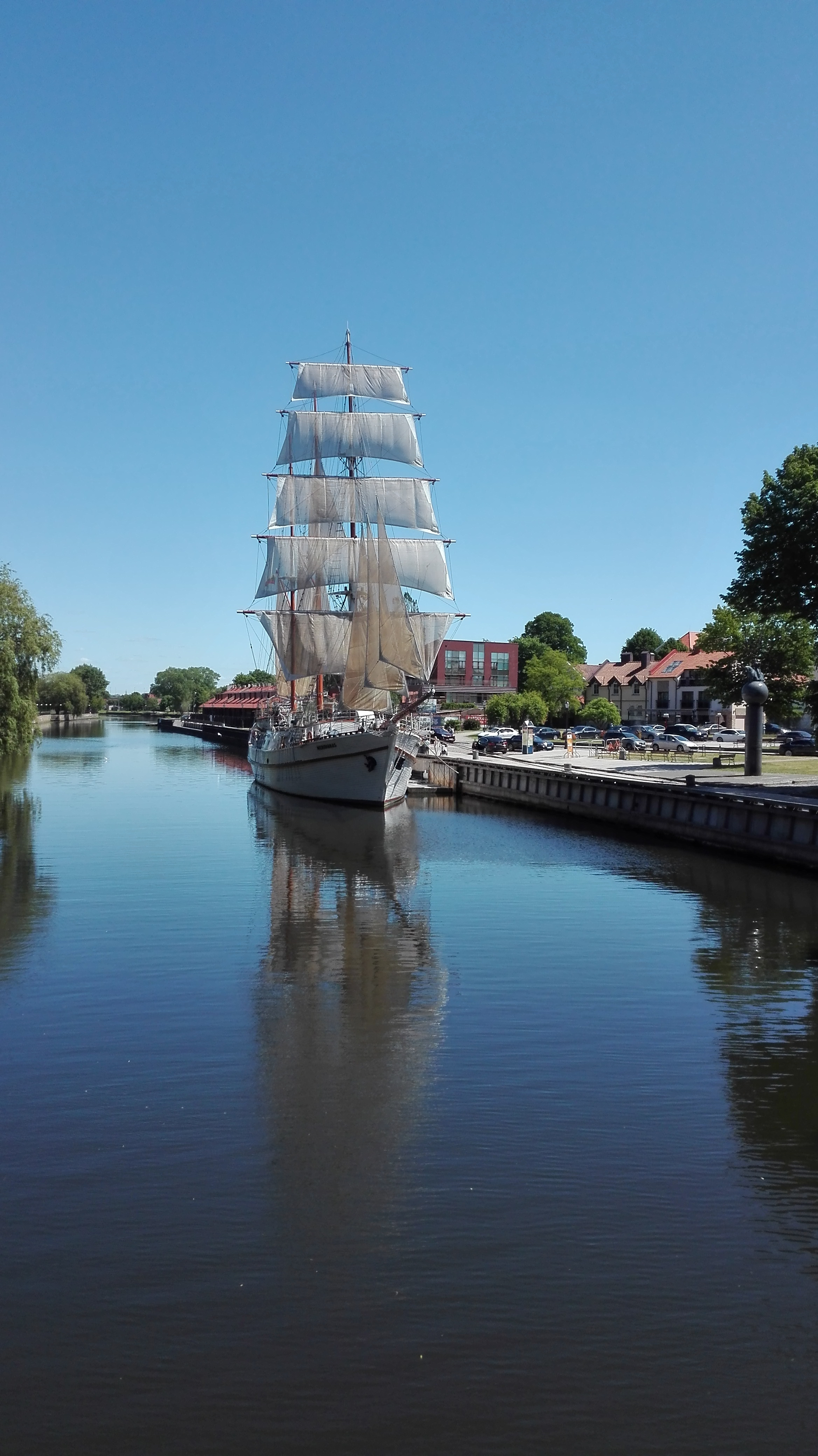 Meridianas 2017 m.